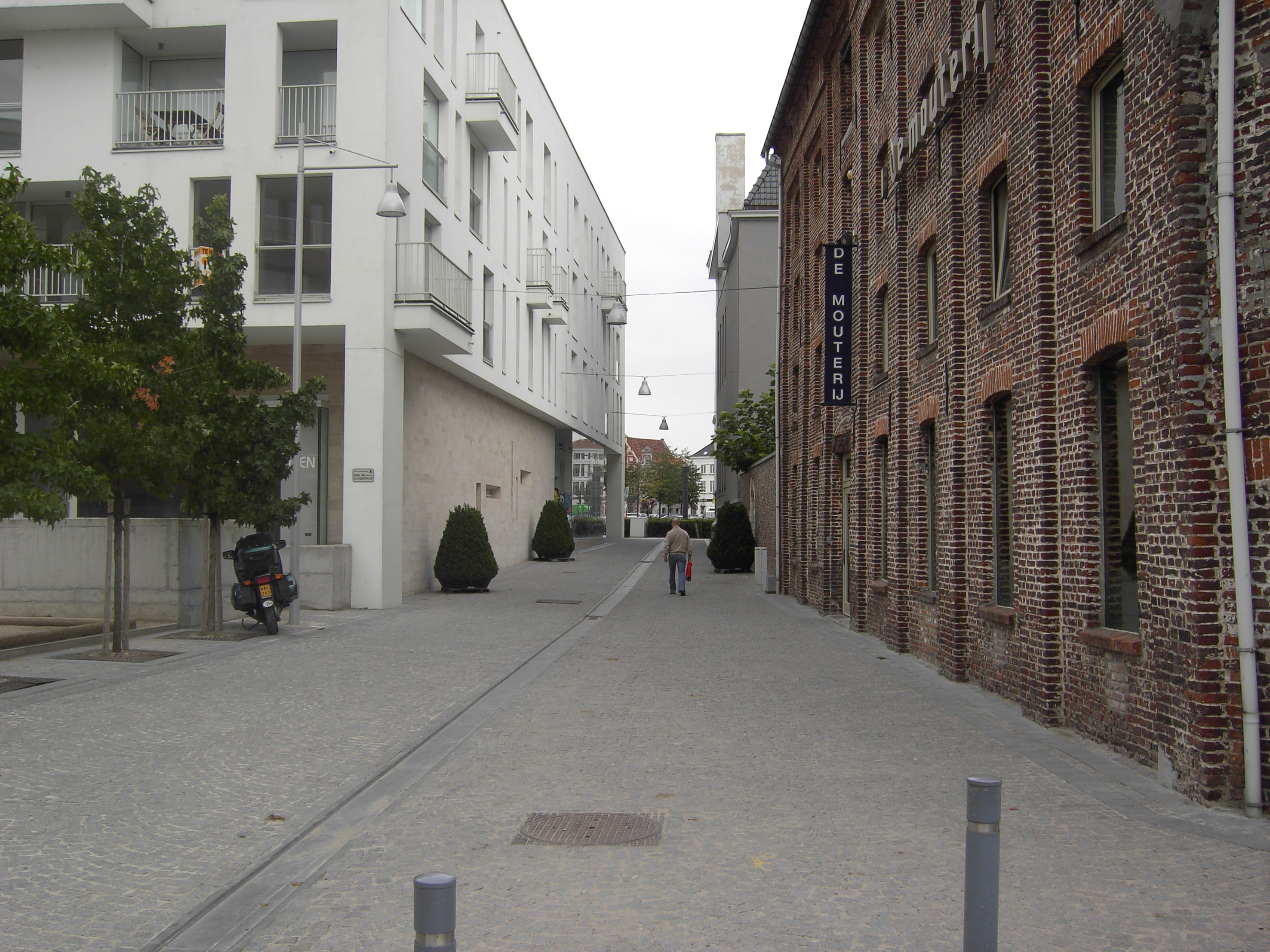 De Mouterij - Oudenaarde - Oost-Vlaanderen - Vlaanderen - België